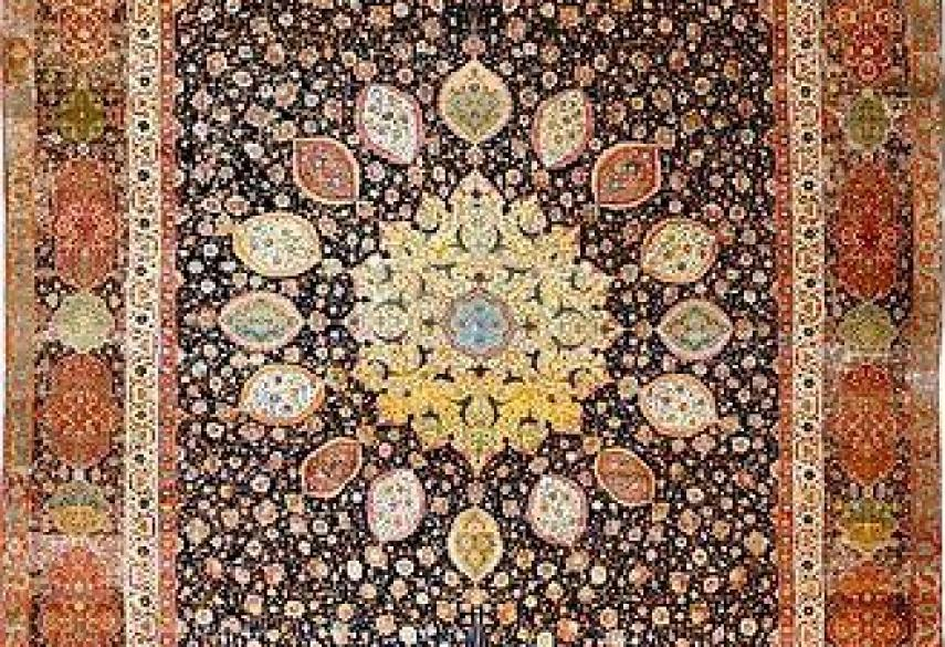 xalça